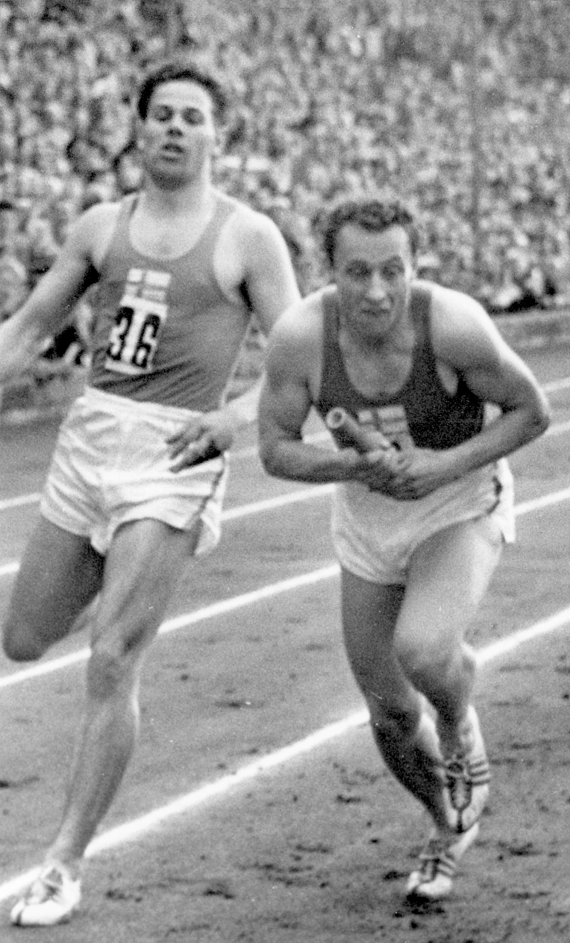 Left-right: Pentti Rekola, Voitto Hellstén